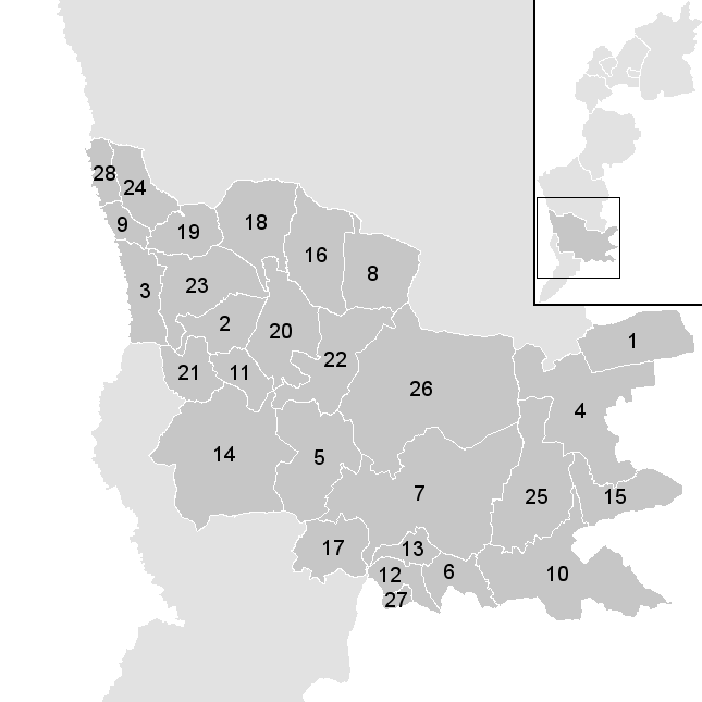 Leere Karte mit den Gemeinden im Österreichischen Bezirk Güssing